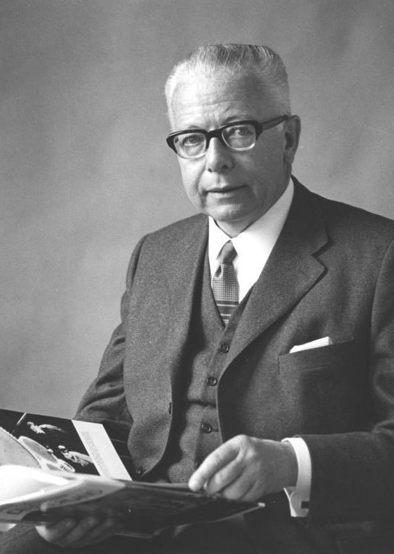 Porträt Gustav Heinemann Information added by Wikimedia users.*